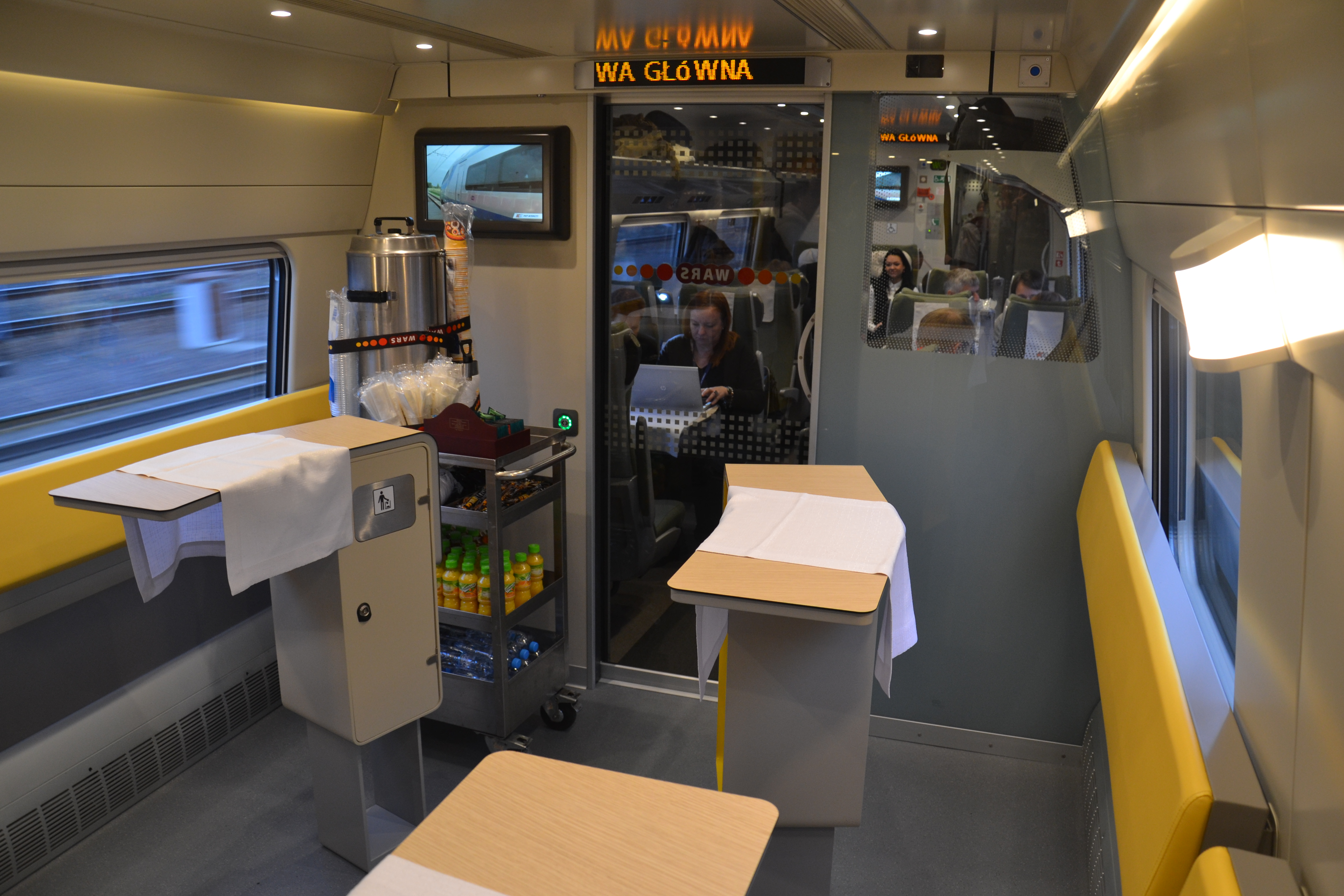 Widok przedziału barowego w ED250-007